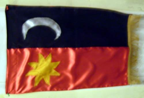 Flag of Székely